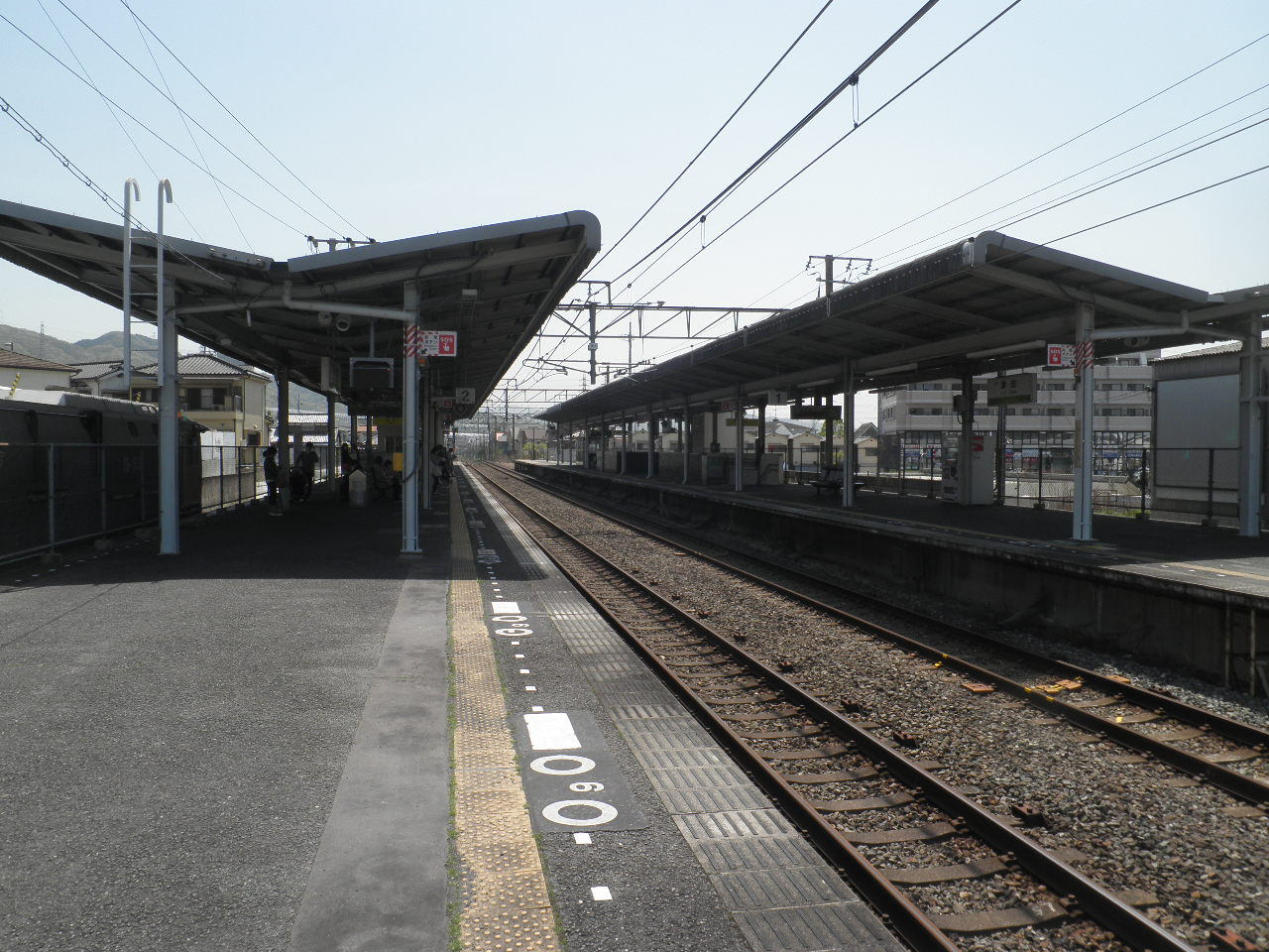 津田駅のホーム